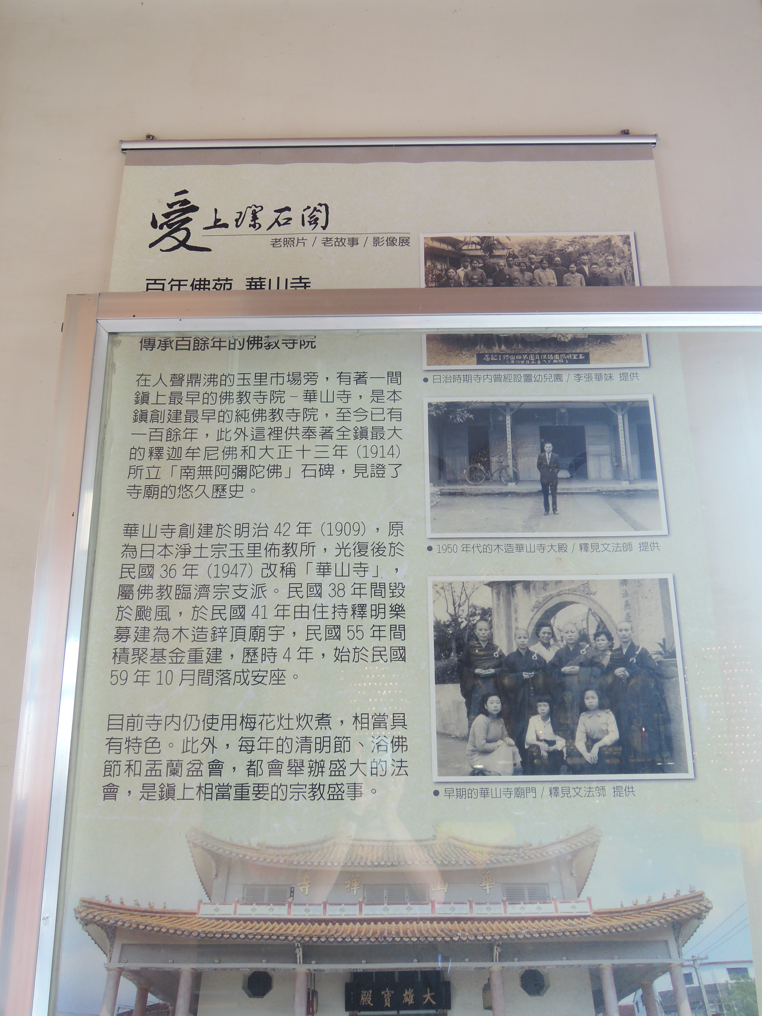 玉里鎮泰昌里和平路75號